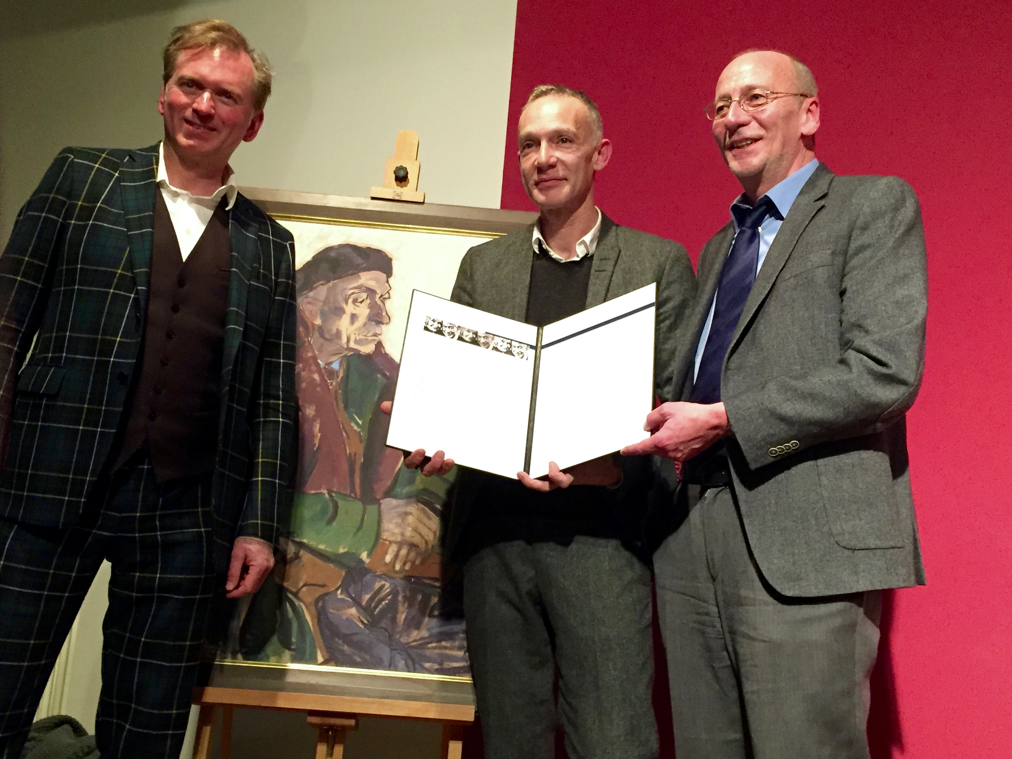 Verleihung des Ernst-Hoferichterpreises 2015 an Christoph Süß (Mitte). Links: Christoph Springer (Laudator). Rechts: Hans-Georg Küppers (Kulturreferent München)